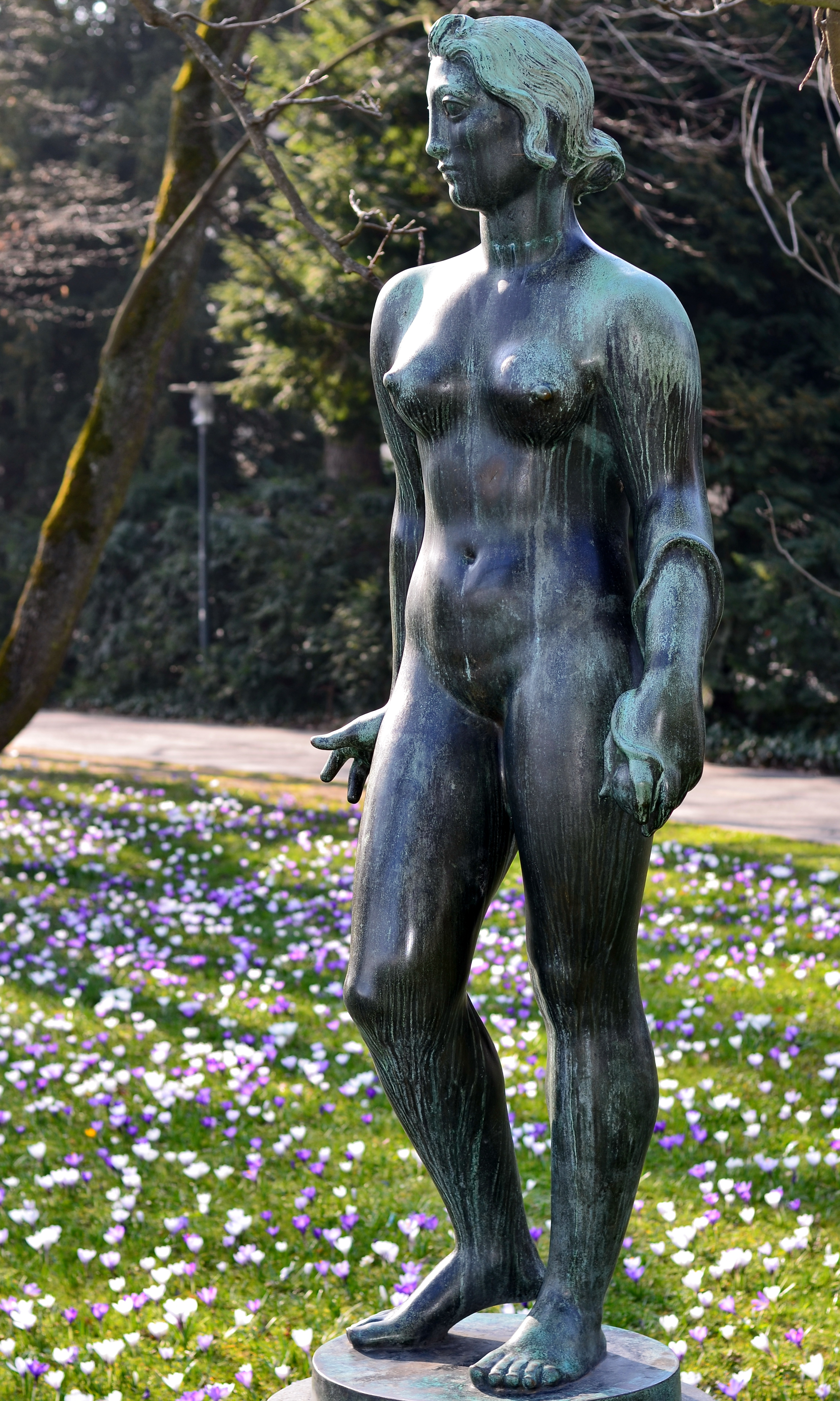 Arboretum in Zürich-Enge